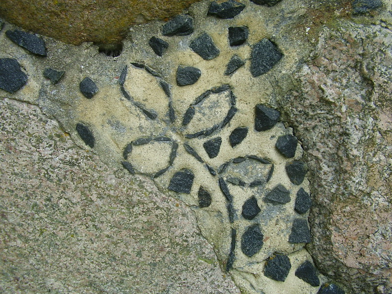 Маркава. Свята-Троіцкая царква